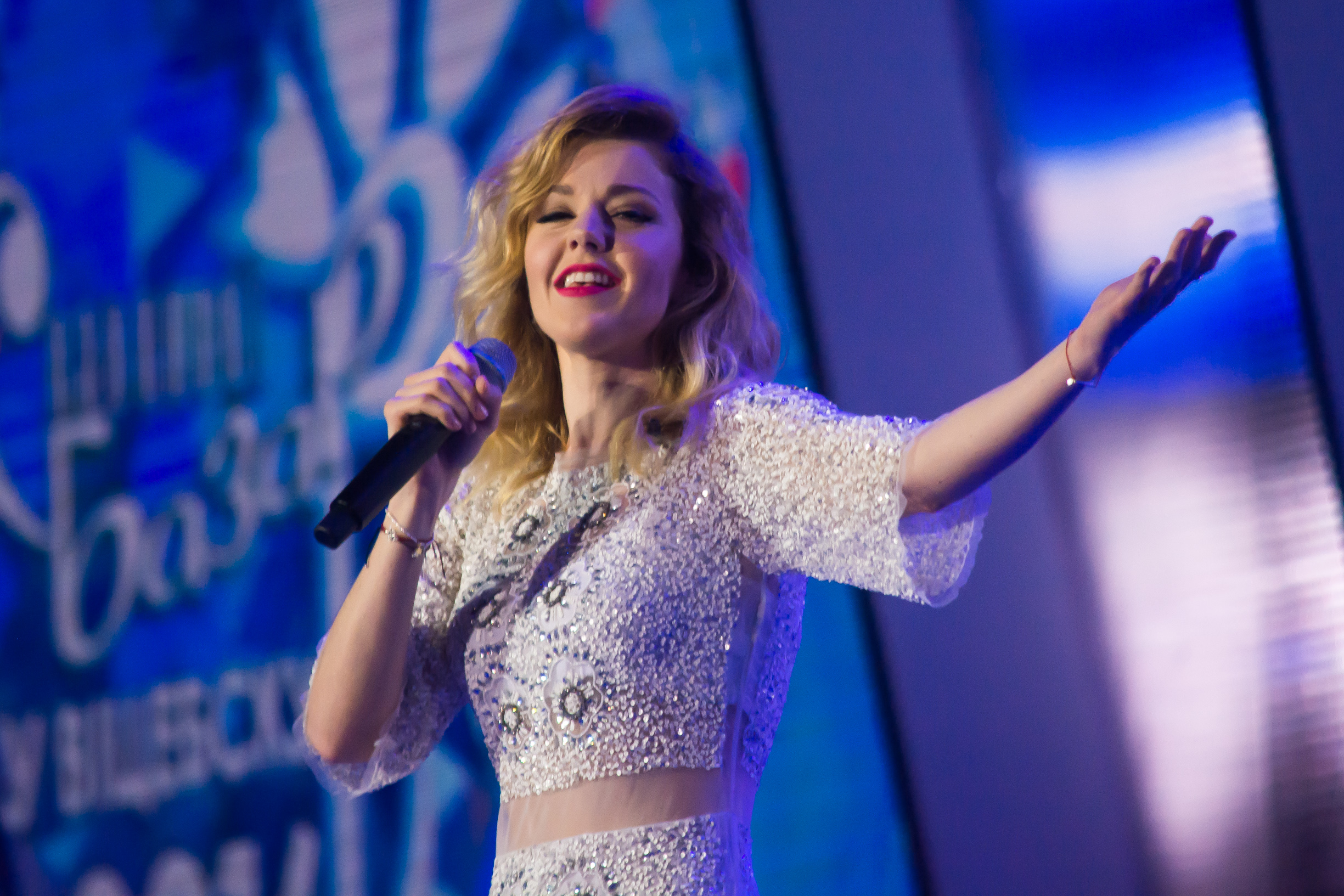 Юлианна Караулова на Europa Plus TV. Hit Non Stop в Витебске 2016